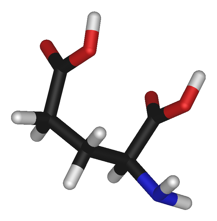 L-glutamic-acid-3D-sticks